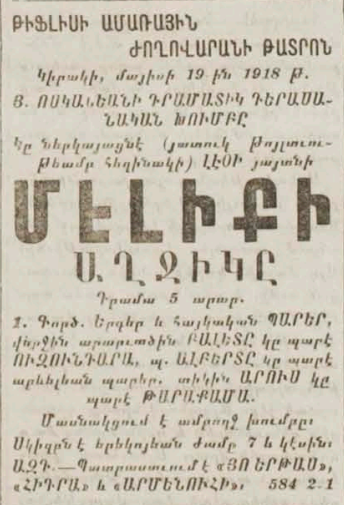 Газета "Հորիզոն", 1918 г. Объявление о представлении "Дочь мелика" на одноимённое произведение Лео.